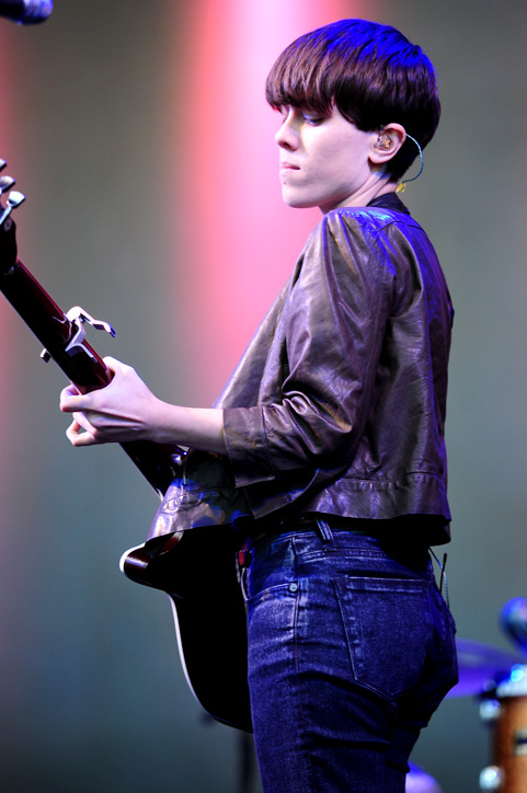 Tegan and Sara @ NIB Stadium (4/12/2010)